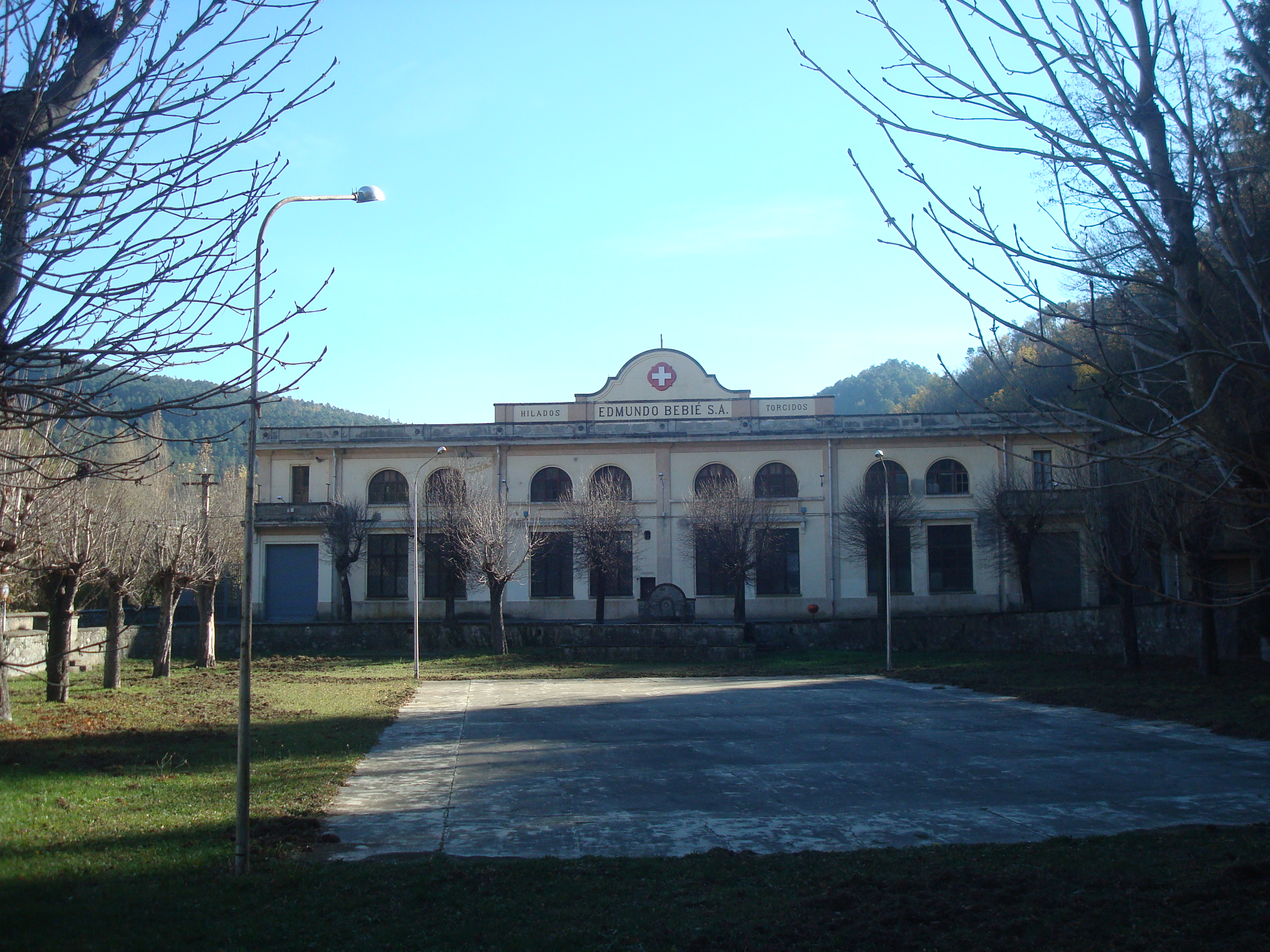 Vista de la fàbrica de La Farga de Bebié des de la pista.